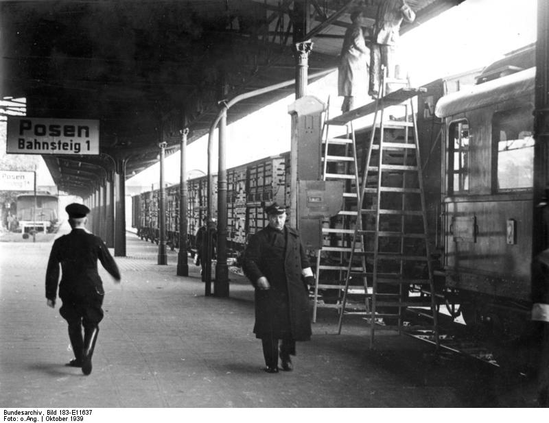 Posen, Hauptbahnhof Scherl: Auf dem Posener Hauptbahnhof tuen deutsche und polnische Bahnbeamte gemeinsam Dienst. Fot. Ho. 19.10.39 ADN: Zentralbild II. Weltkrieg 1939-45 Im besetzten Polen, Oktober 1939. Auf dem Hauptbahnhof in Posten arbeiten die polnischen Eisenbahner unter den deutschen Eisenbahnbeamten. Information added by Wikimedia users.